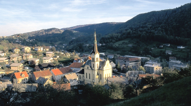 Dol pri Hrastniku